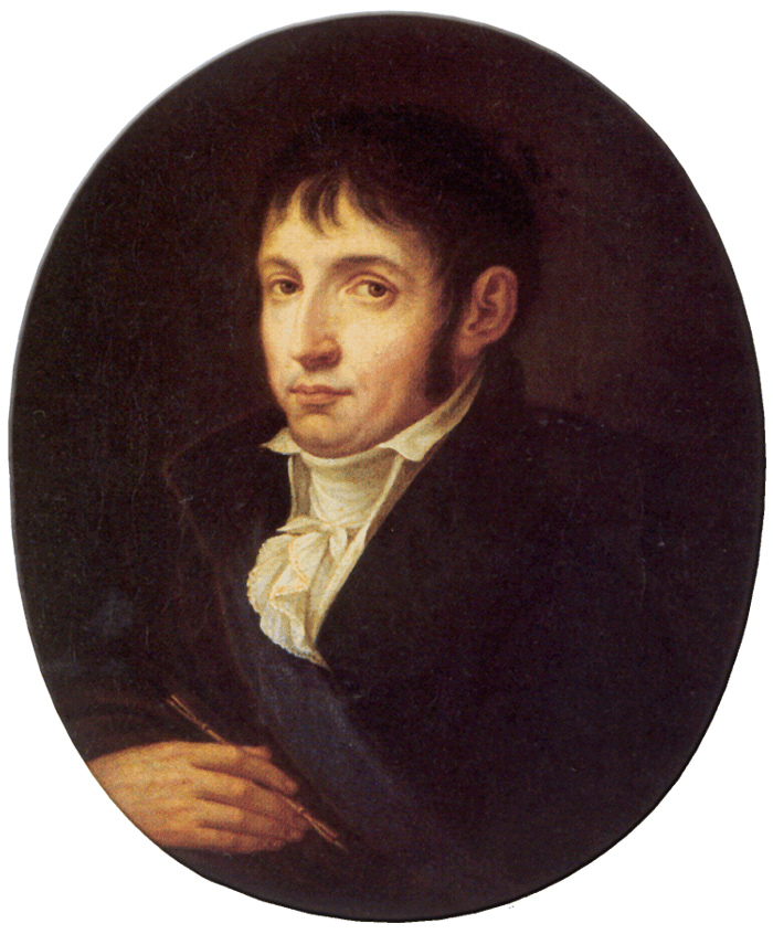 Fusz János zeneszerző, karmester; Budapest, Magyar Nemzeti Múzeum, Történelmi Arcképcsarnok